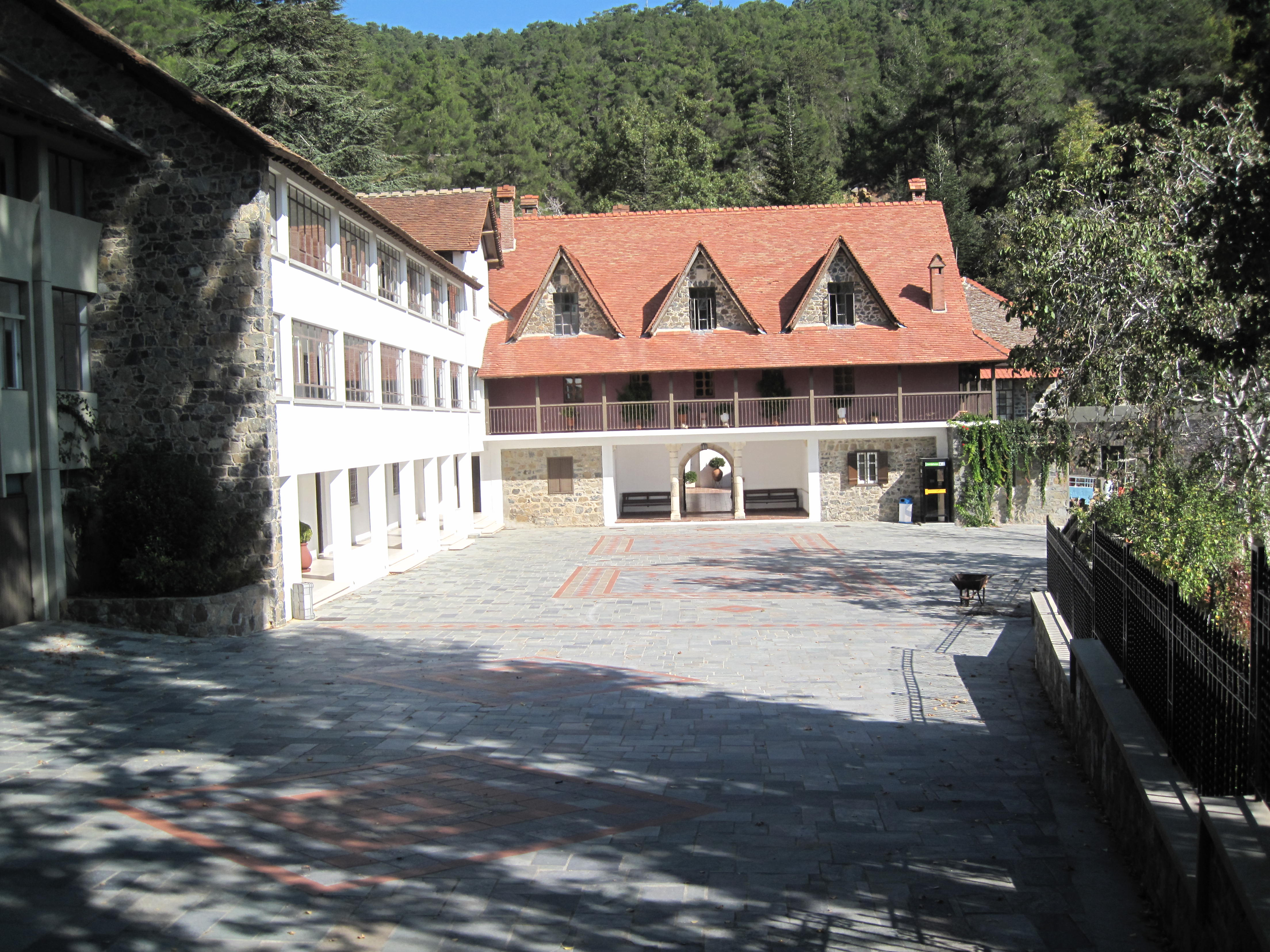 Traditissa klooster